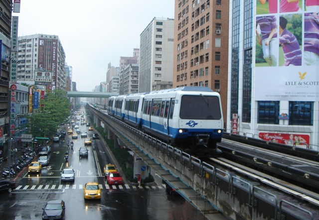 台北捷運文山線。